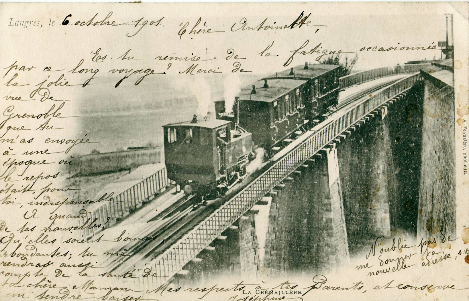 Carte postale ancienne éditée par Veyssière Langres : La crémaillère